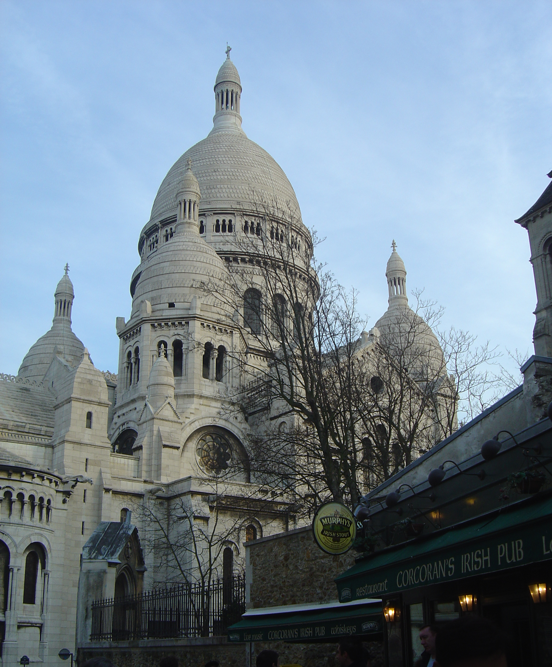 Paris, Montmartre, Rue du Chevalier de La Barre